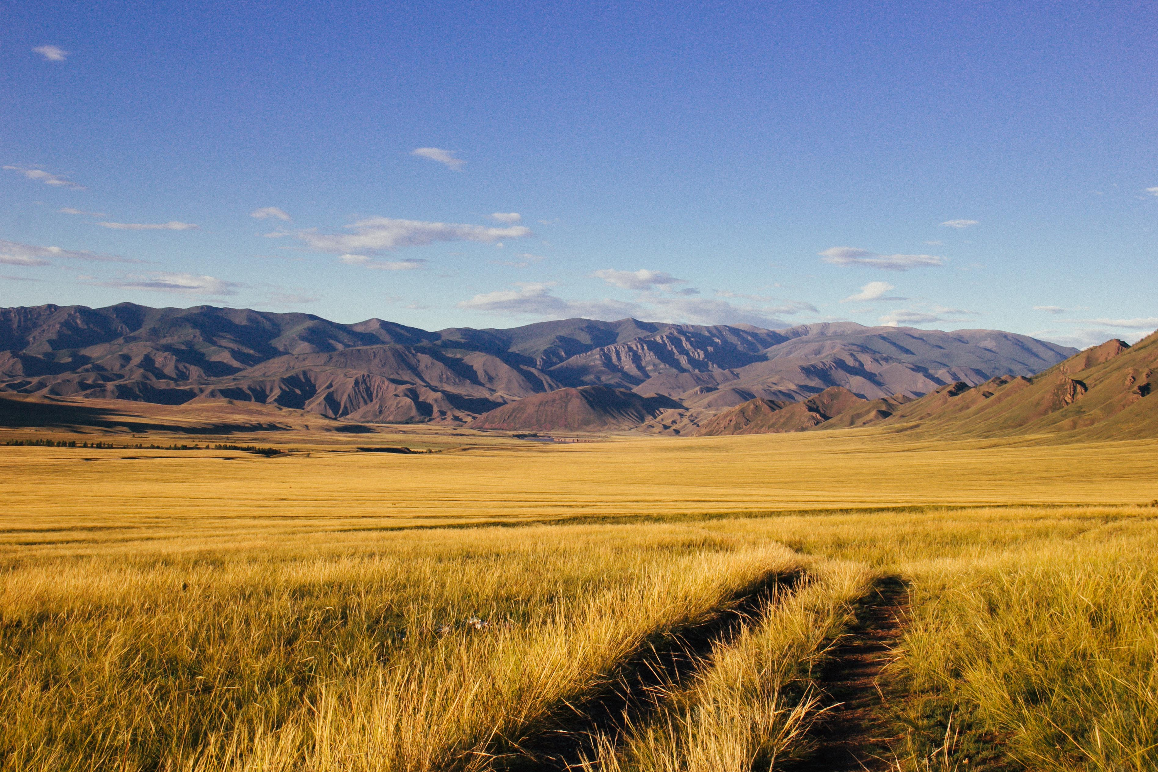 Гора Бегредаа Пий-Хемский район РТ.